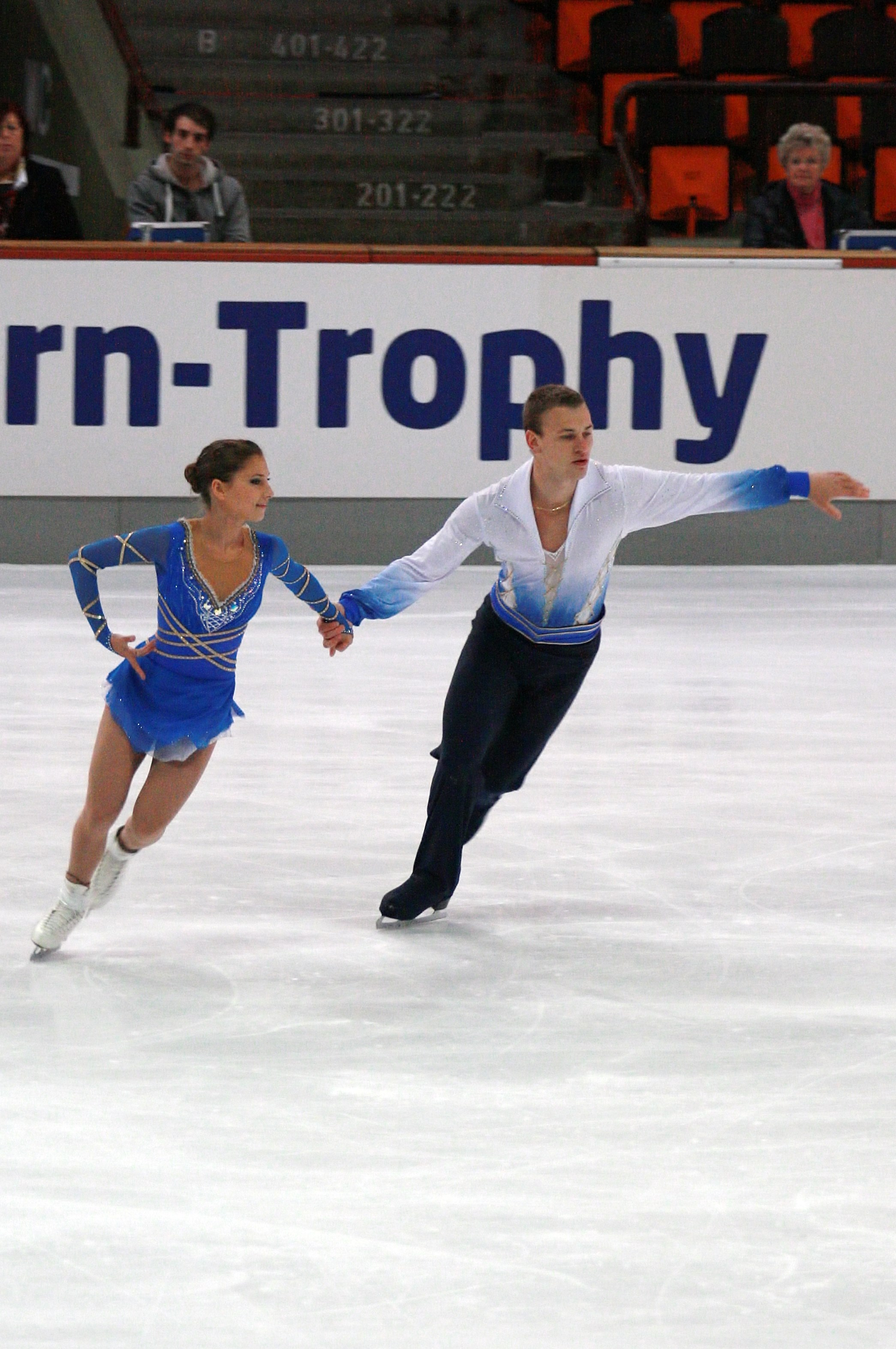 Андреа Давидович и Евгений Краснопольский (Израиль) на 2013 Nebelhorn Trophy